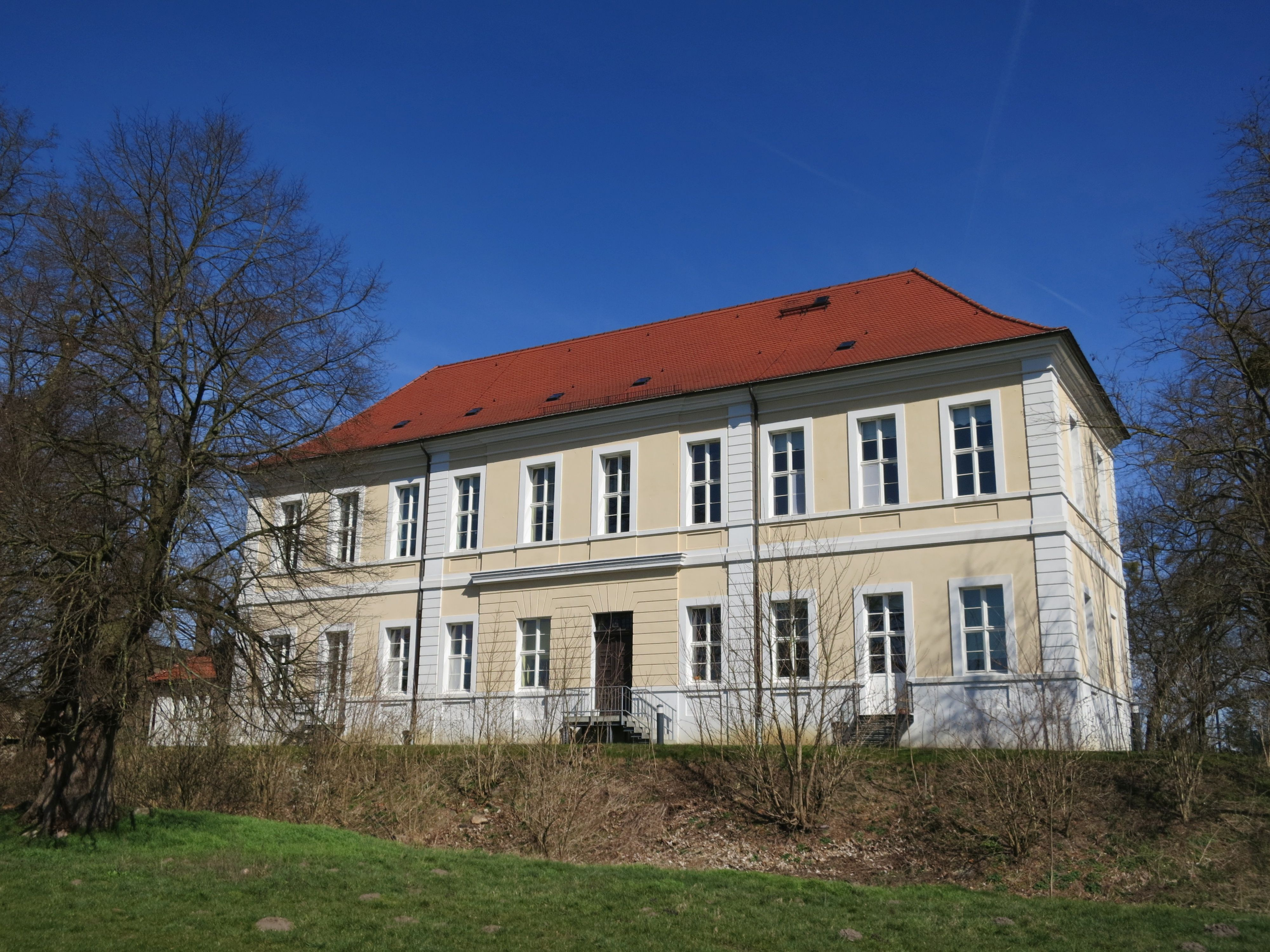 Herrenhaus ("Schloss) Löwenberg auf den Resten einer mittelalterlichen Burg, Blick von Südwesten